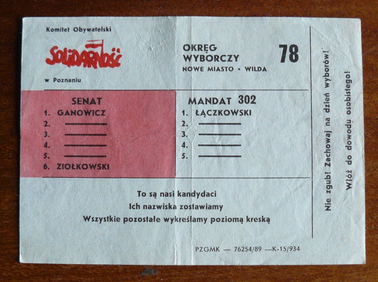 Ulotka wyborcza Solidarności z 1989r. (Poznań).